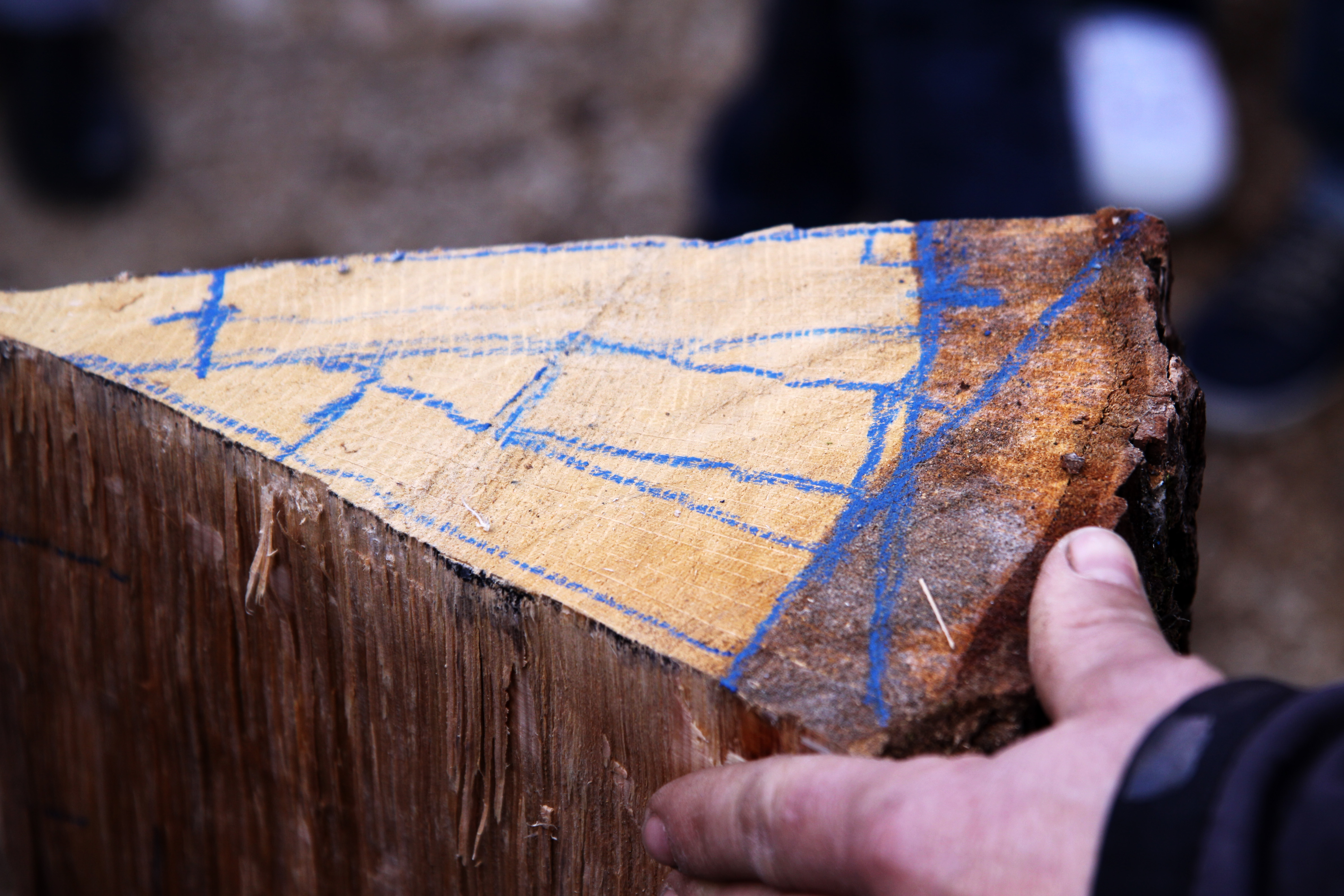 Tracage dans le bois des futurs merrains qui y seront découpés